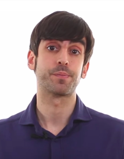 En este vídeo, nuestro diputado, Eduardo Maura nos habla sobre nuestra propuesta para derogar el artículo 71 de la Ley de Propiedad Intelectual